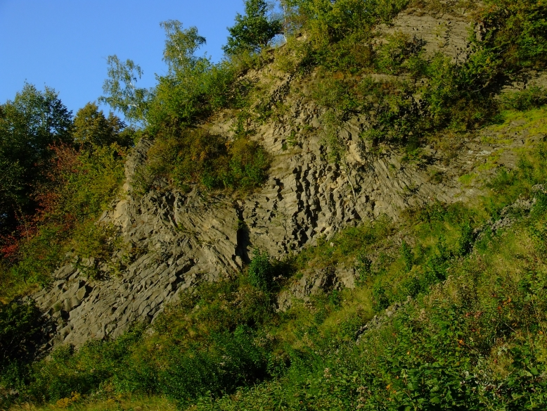 Wilcza Góra(Złotoryja)